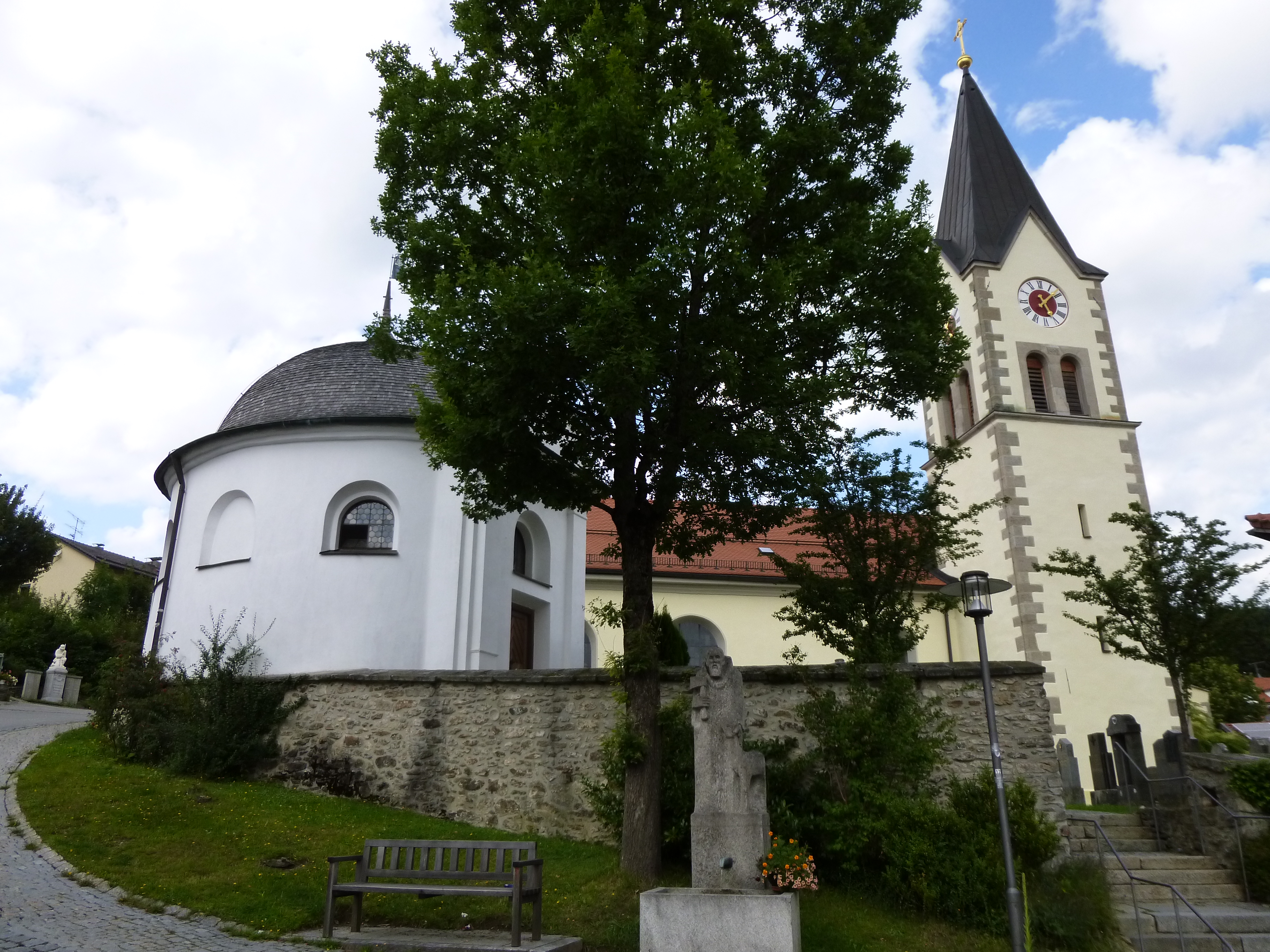 Katholische Pfarrkirche St. Englmar im gleichnamigen Ort im Landkreis Straubing-Bogen.